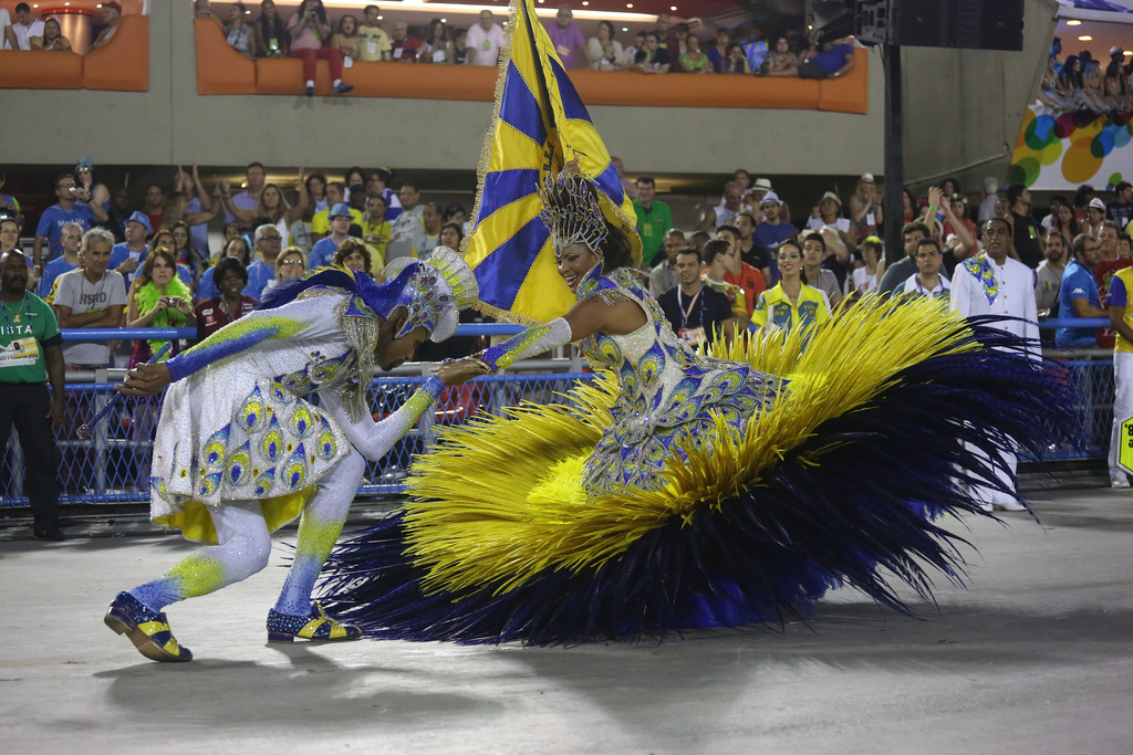 Unidos da Tijuca é campeã do Carnaval do Rio.